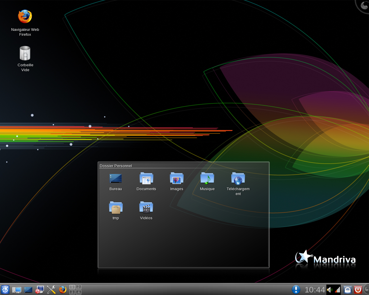 Capture d'écran du bureau KDE 4.1 de MAndriva 2009 Okapi (Beta 2)